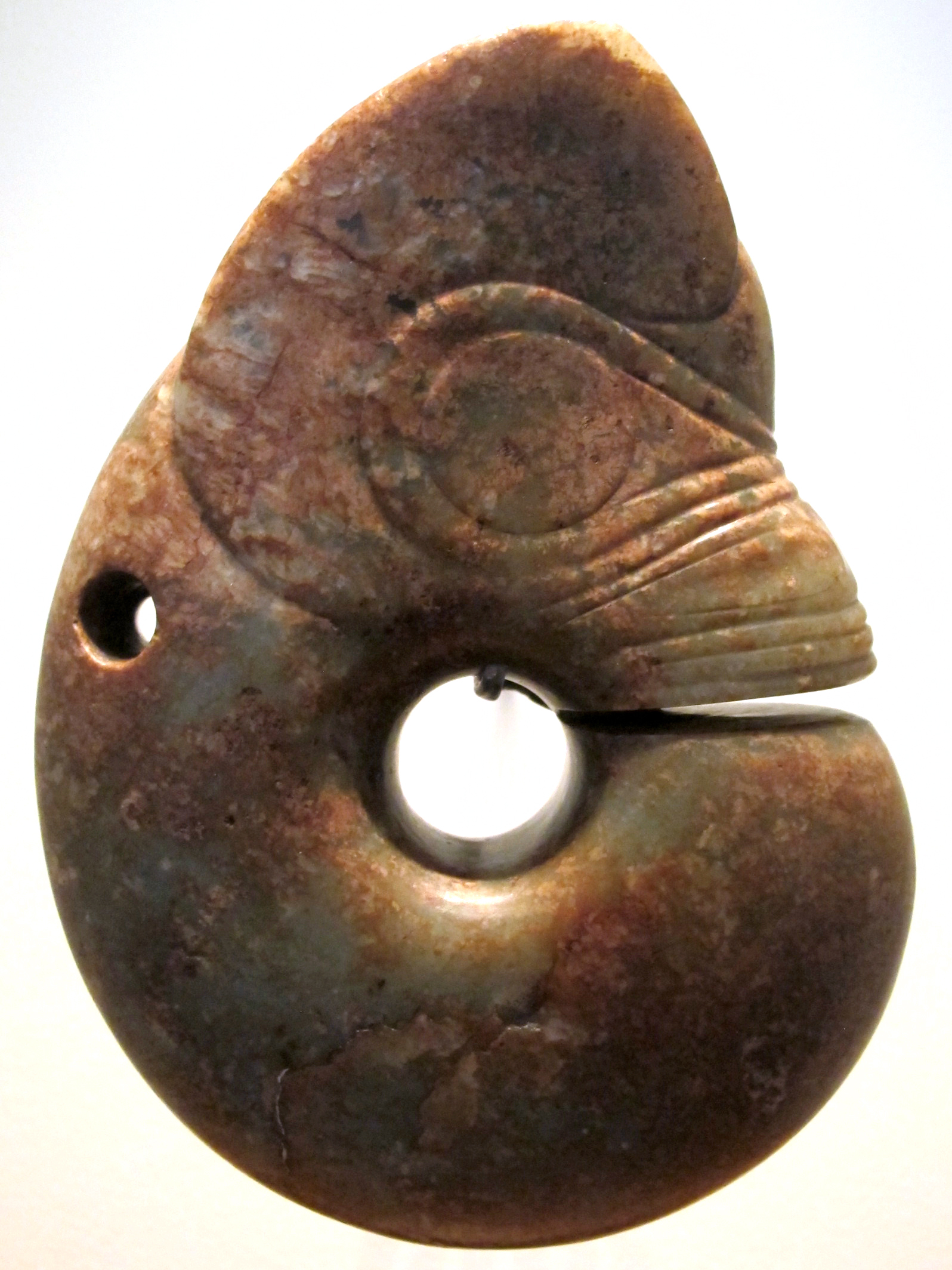 Cultura di hongshan (neolitico), oggetto rituale zhulong (dragone-maiale) in nefrite, da lianing, 3500 ac.